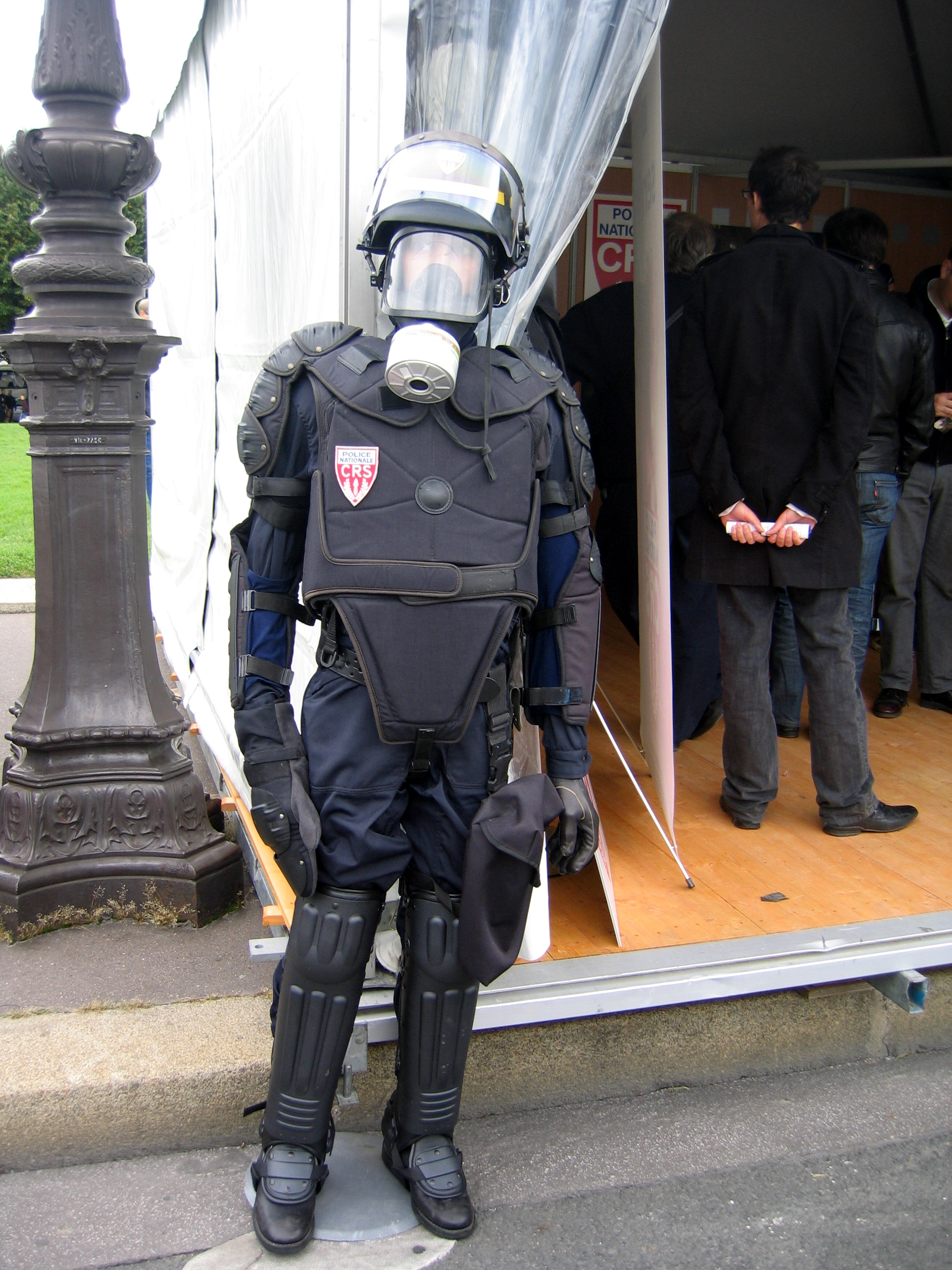 Tenue CRS pour manifestation lors des journées de sécurité intérieures 2009 sur l'esplanade des Invalides.